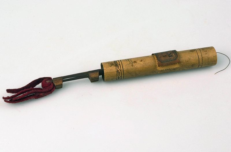 Tokkelinstrument. Mondharp en koker van bamboe